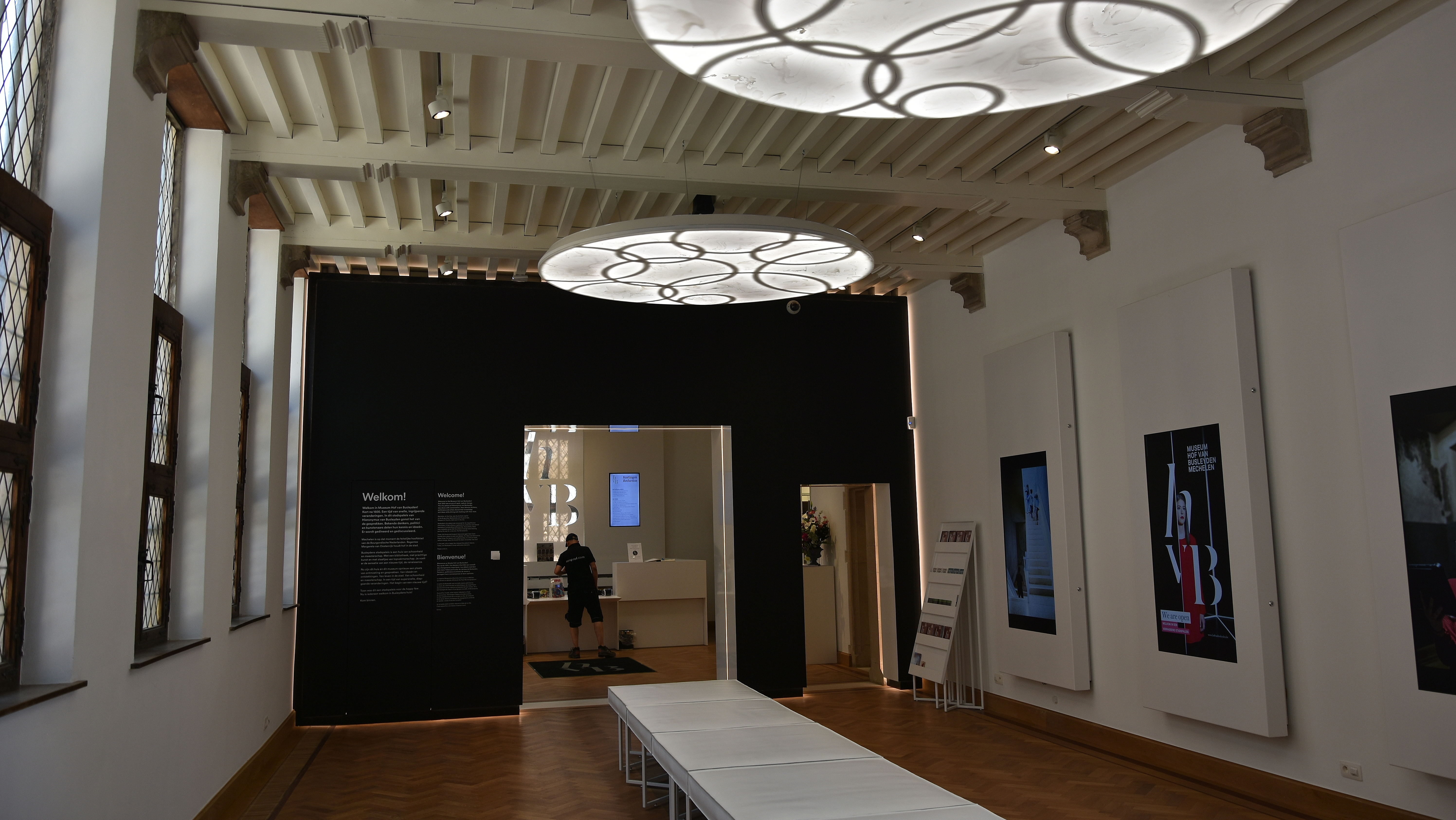 Museum Hof van Busleyden Mechelen 6-07-2018 11-53-33 This photo of immovable heritage has been taken in the Flemish Region